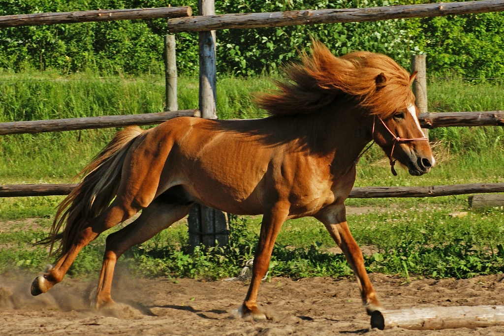 Foto no personīgajiem arhīviem, autors Evija Sidraba, autors atļāvis fotogrāfijas izmantošanu (sk. diskusiju).